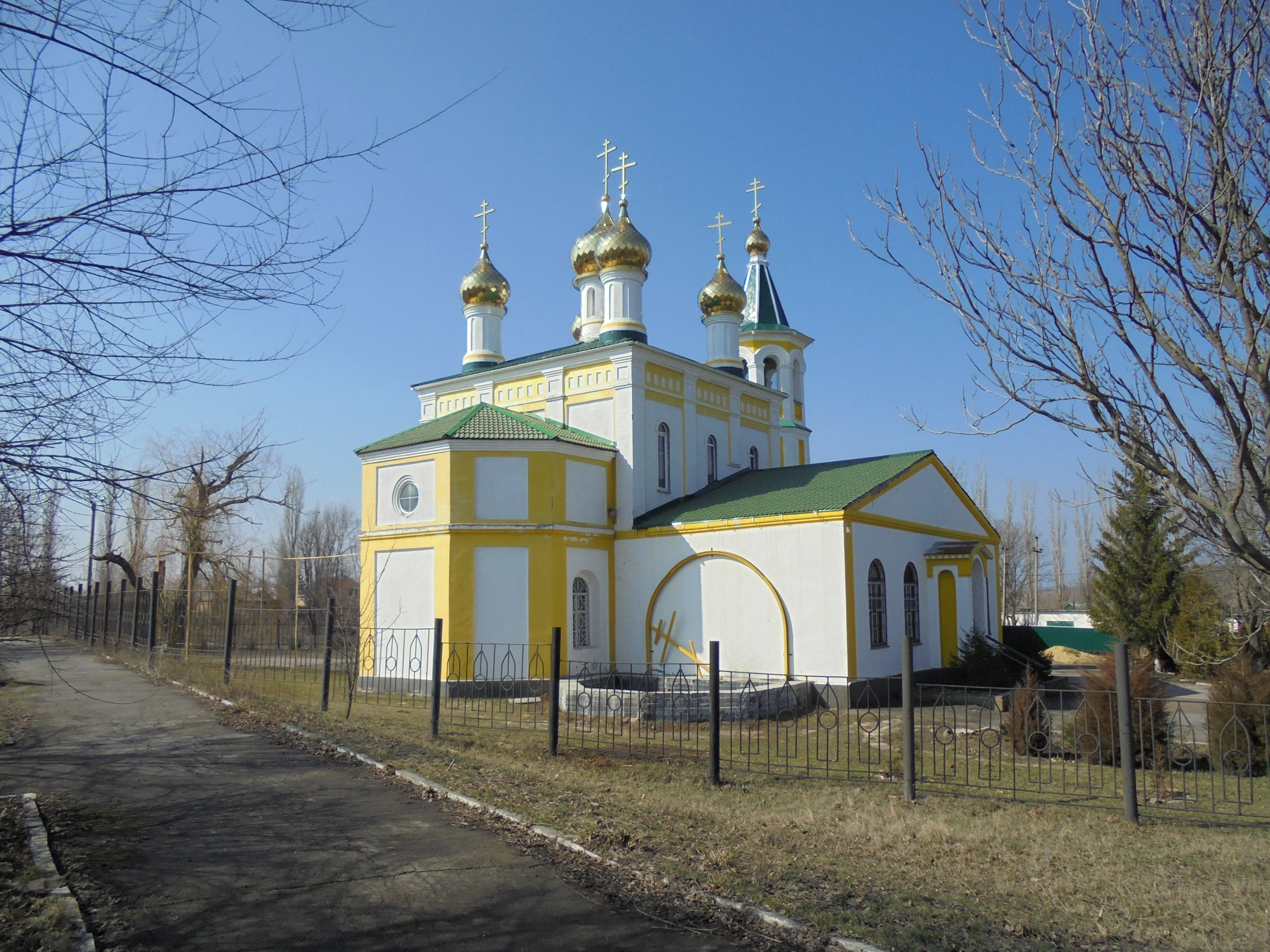 Церковь Николая Чудотворца в поселке Аютинский (Шахты).